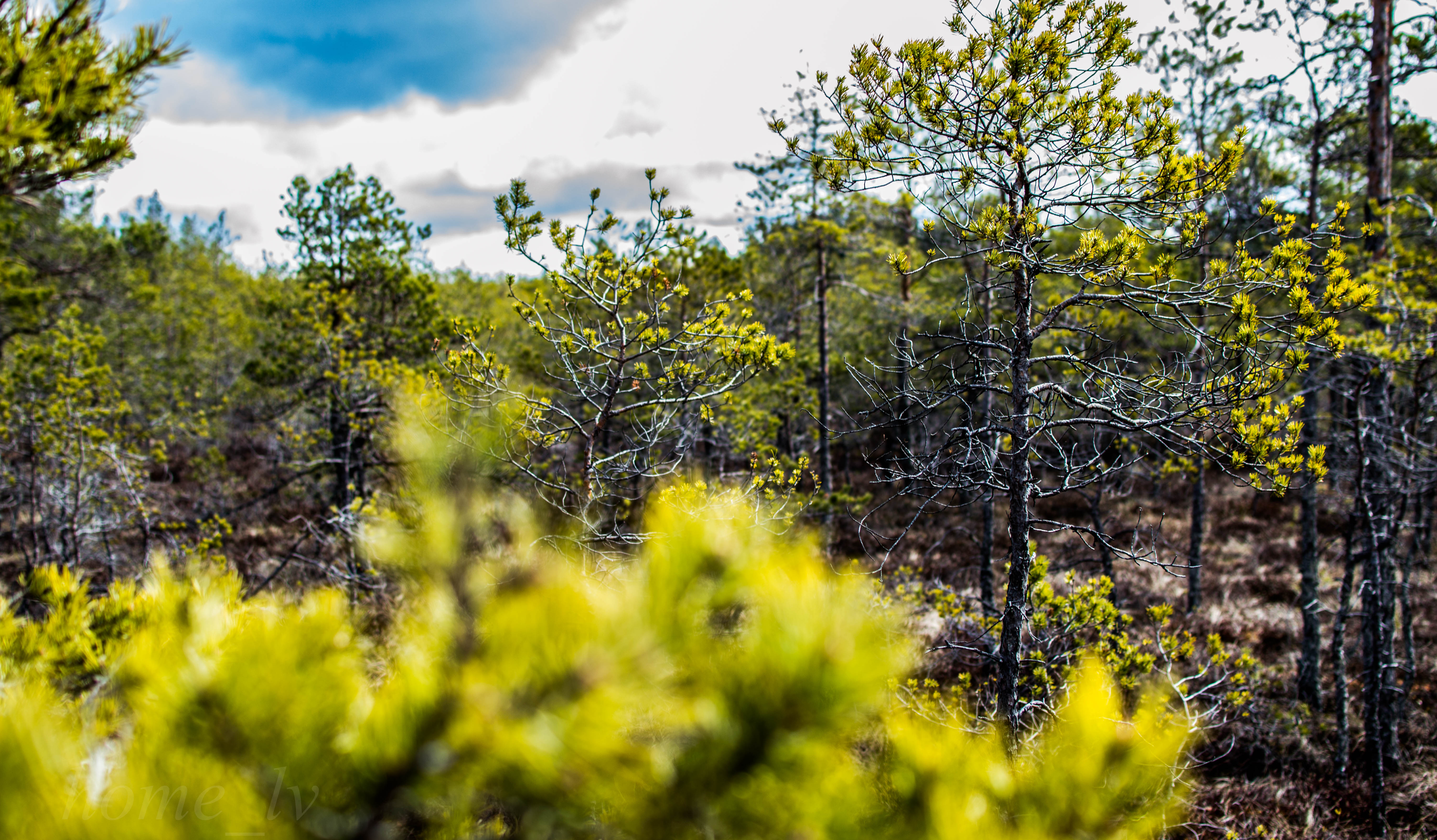 Ķemeru nacionālais parks